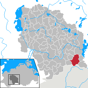 Buchberg in Mecklenburg-Vorpommern - District Parchim